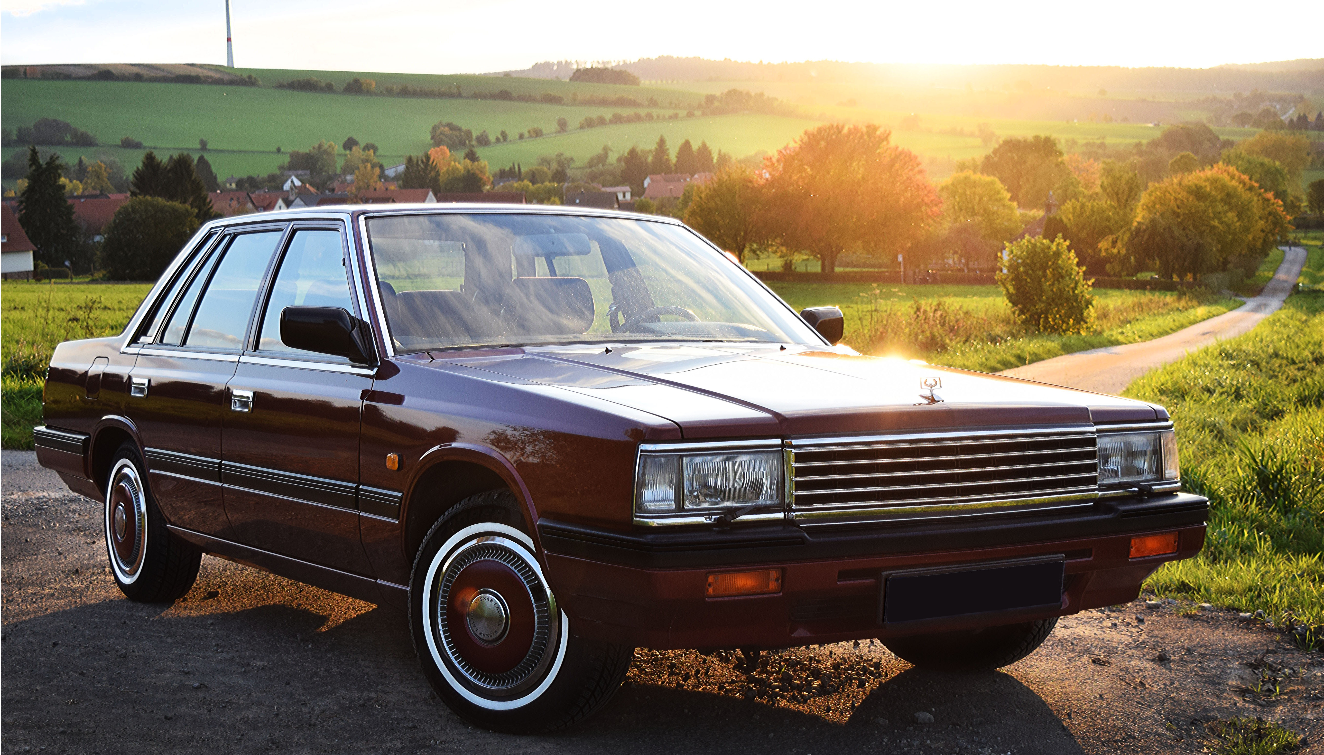 Nissan Laurel 2.4E SGL 1985-1986